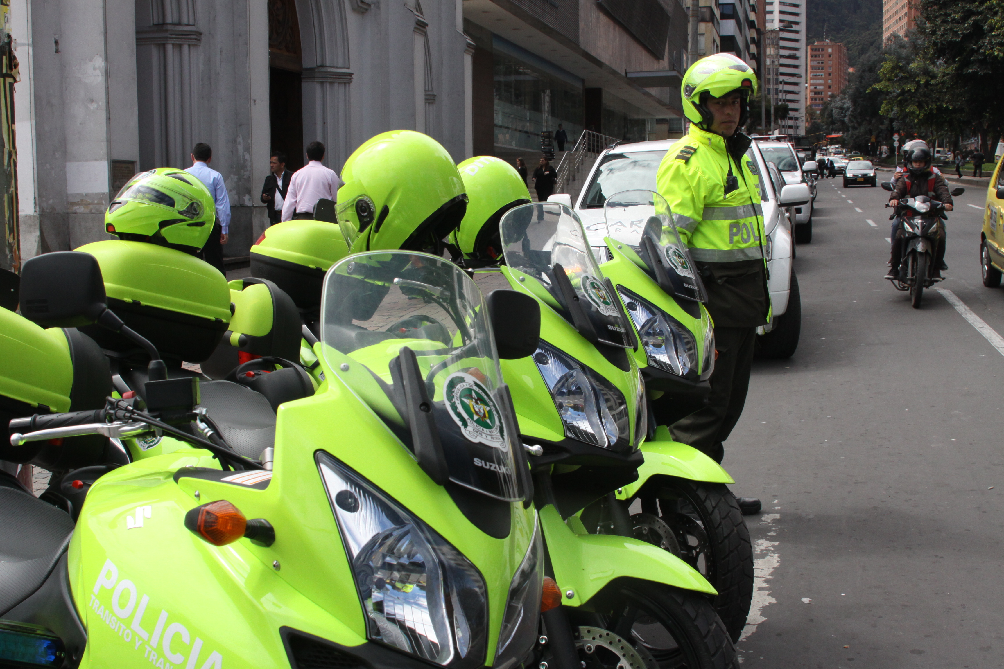 Intervención a la ciudad de Bogotá